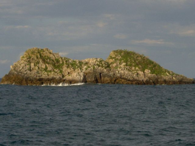 Castru'l Gaiteru, in Celoriu (Asturies-Spain).